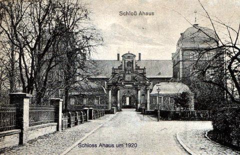 Oldenkott